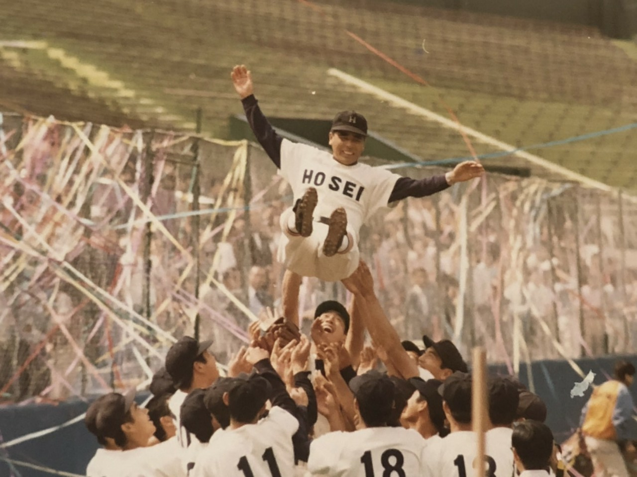 六大学 全勝優勝